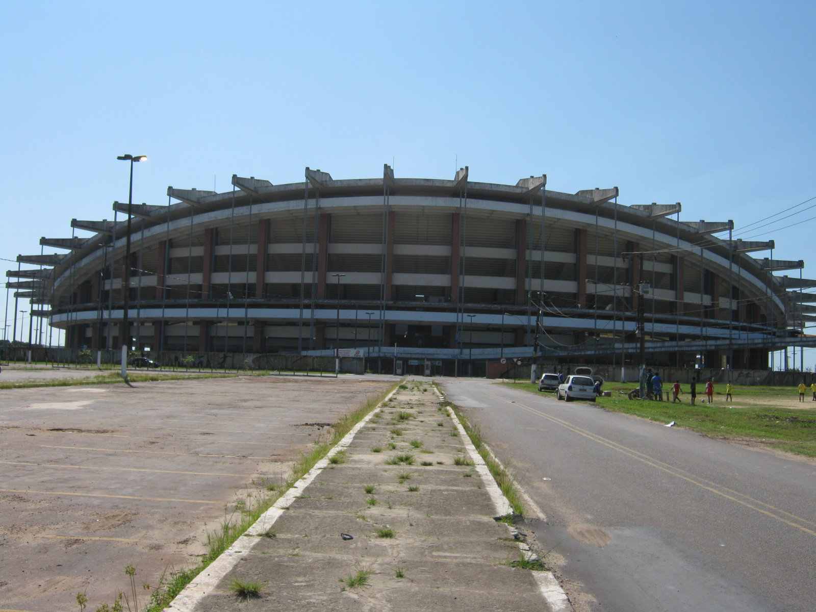 BELÉM DO PARÁ, Brazil (134)